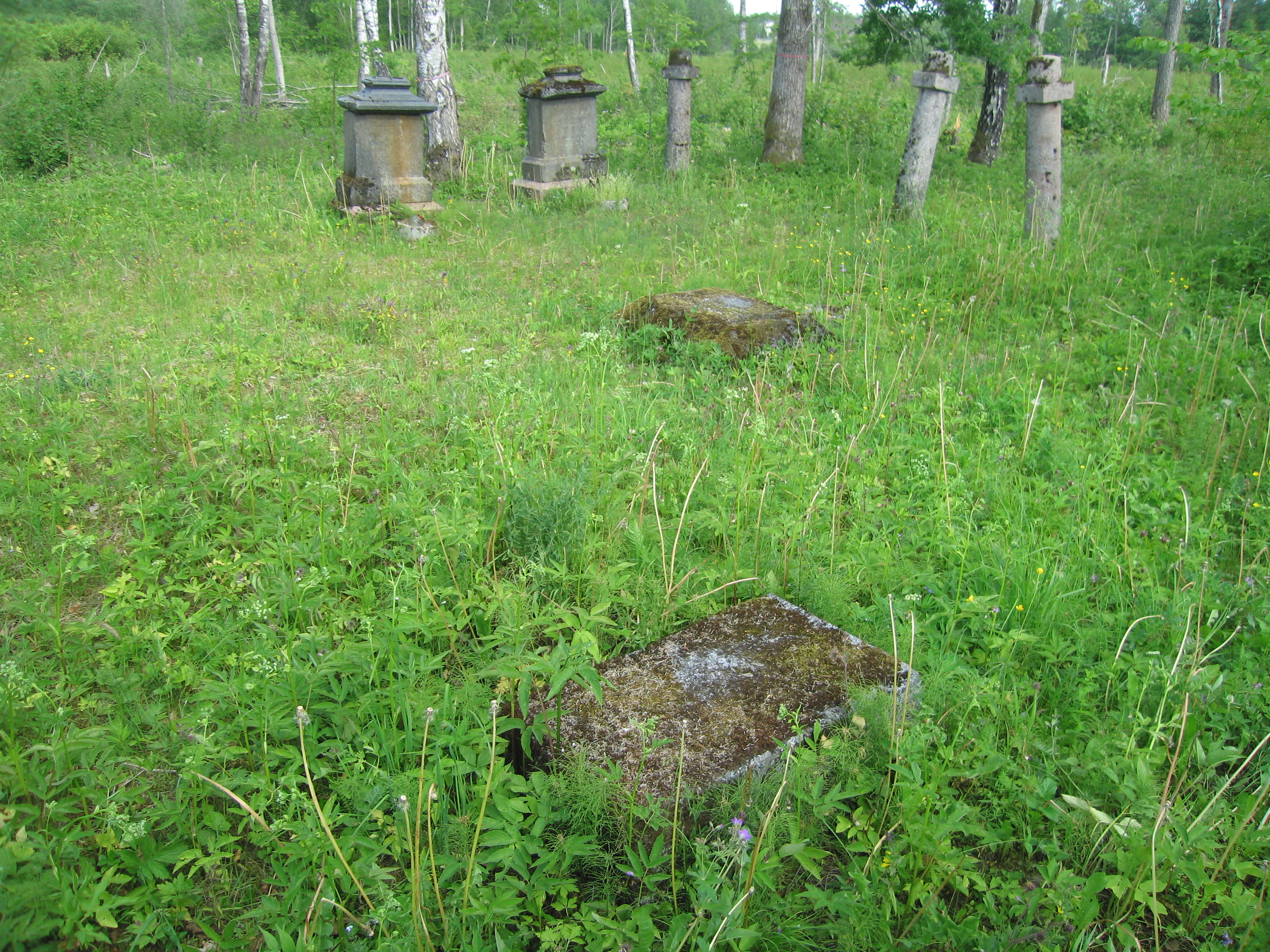 Hauatähised kalmistul